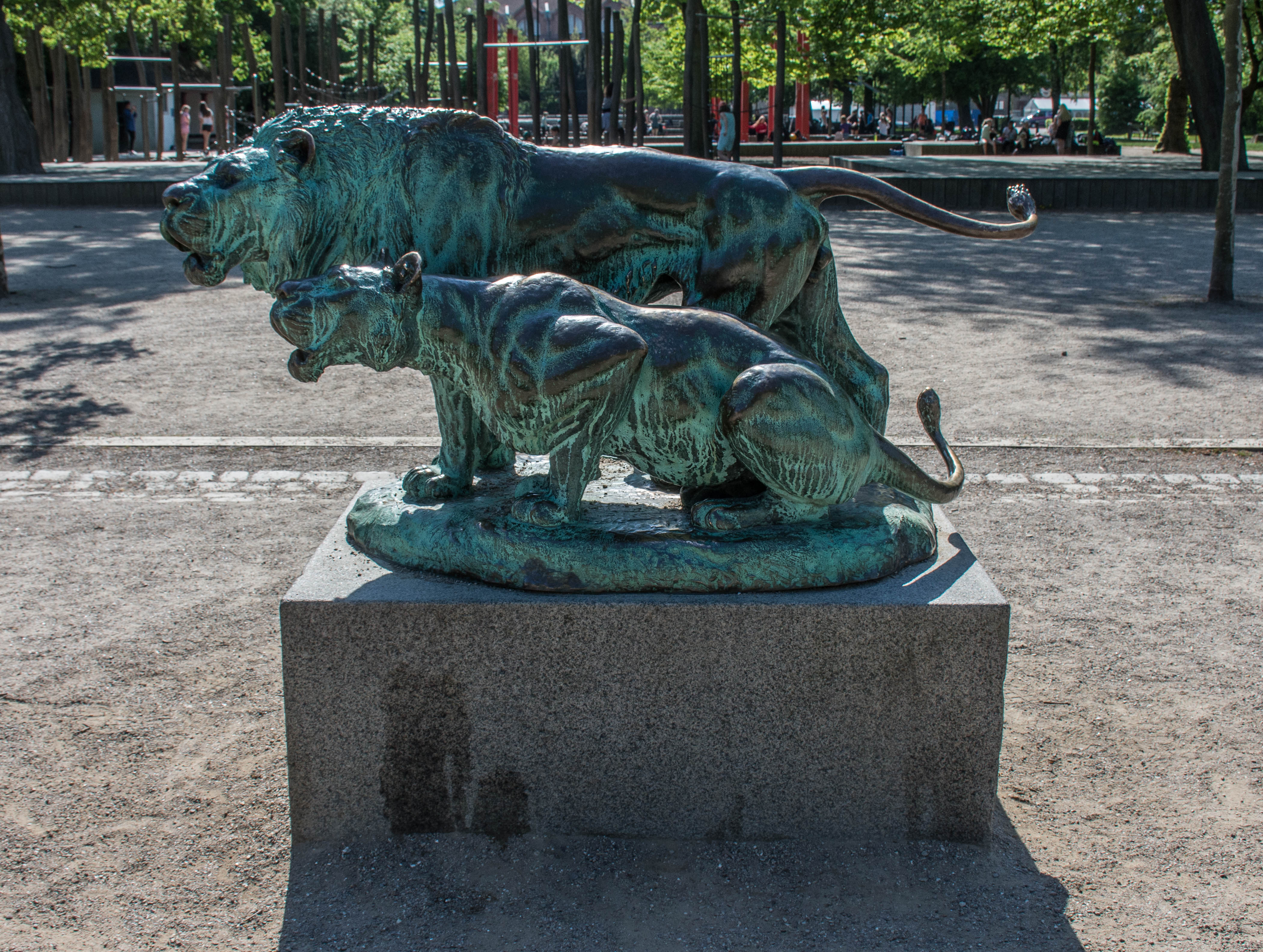 Lauritz Jensen's sculpture Two Lions on Gunner Nu Hansens Plads in Copenhagen, Denmark